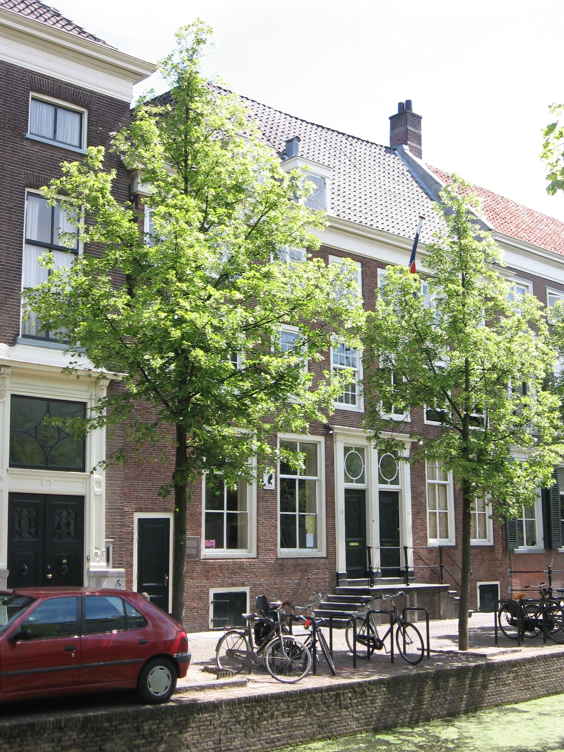 Delft - Oude Delft 50-52.jpg, rijksmonument